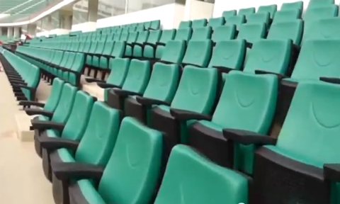 Stadio di Agadir Péosti Vip